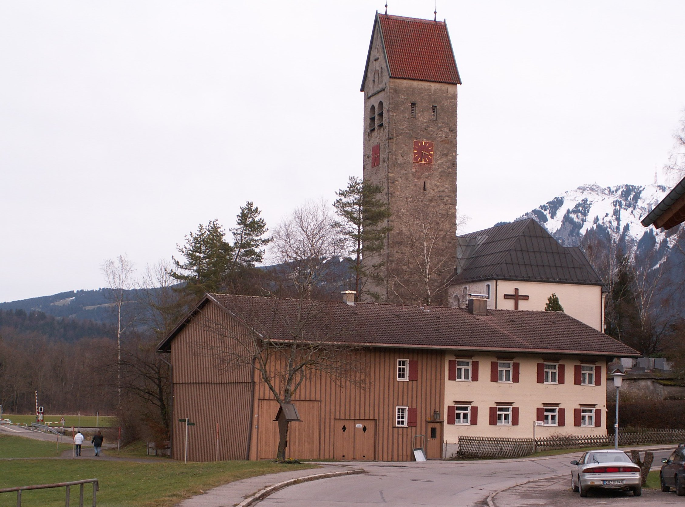 Pfarrhof und Kirche in Stein im Allgäu, Immenstadt im Allgäu